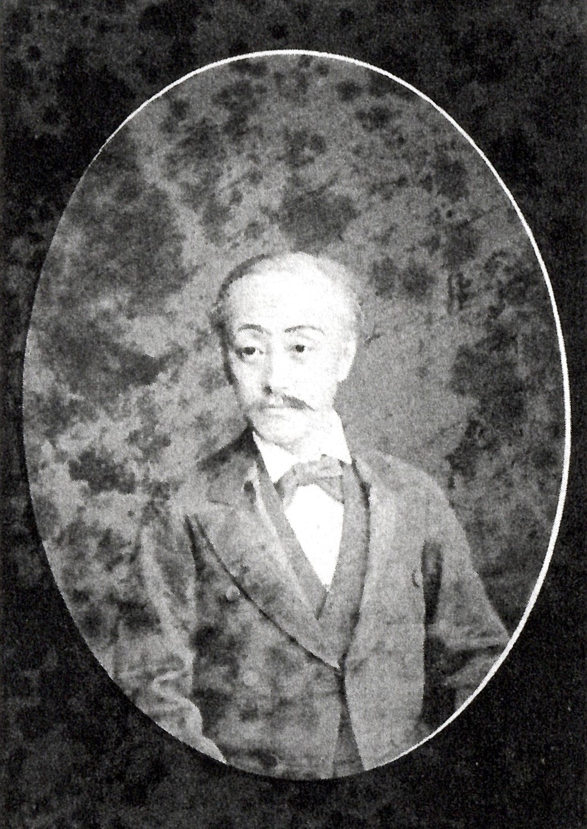 遠藤(東)胤城の肖像写真。